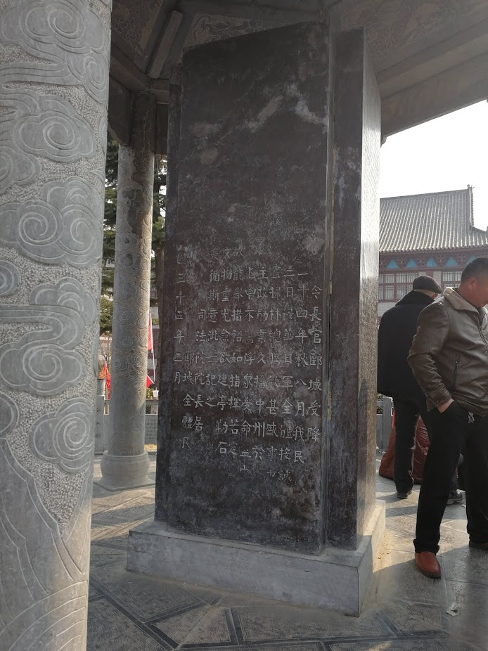 中文（中国大陆）: 受降亭石碑之受降记